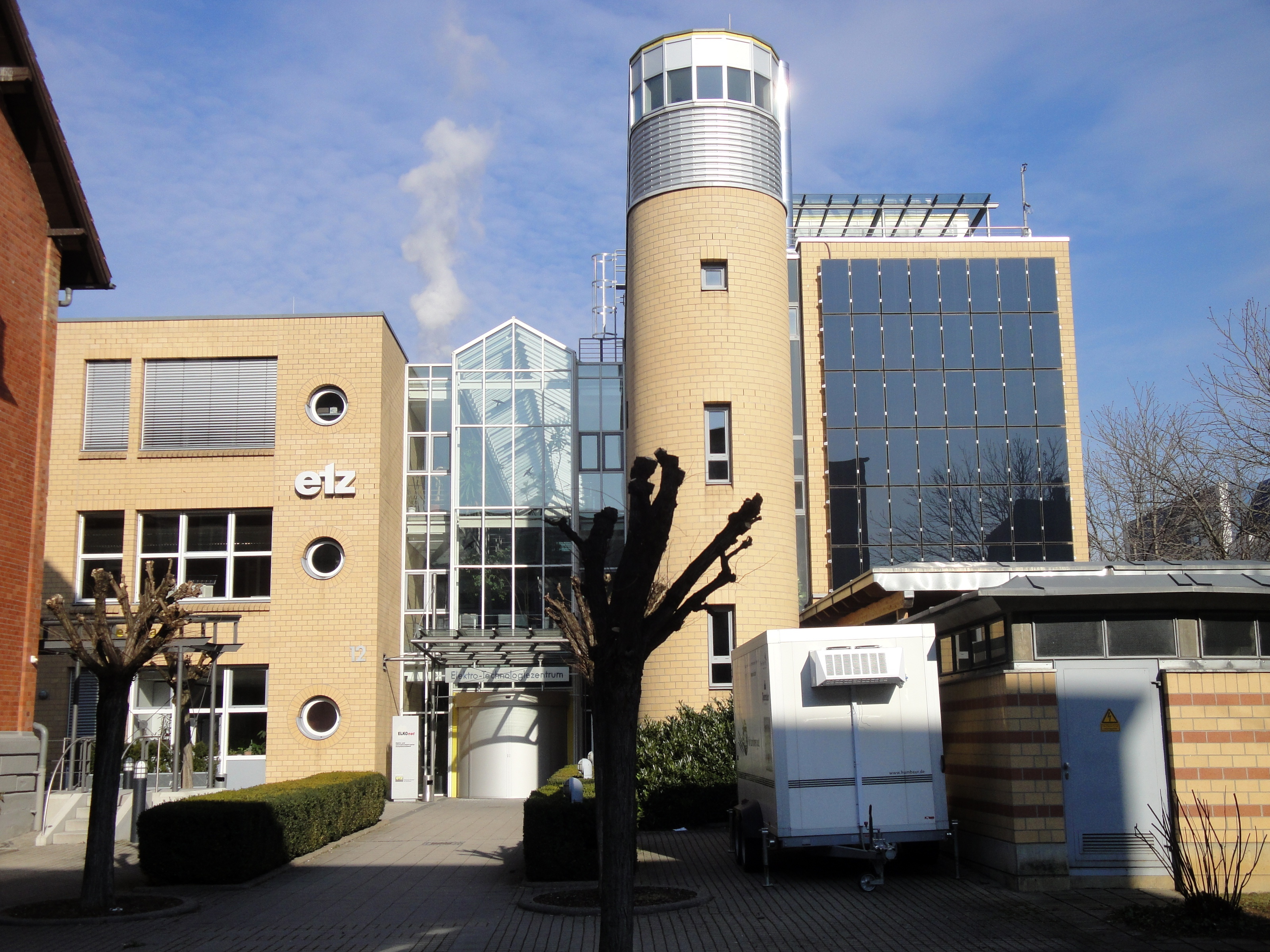 Elektro Technologie Zentrum (Karl-Heinz Böhnert Haus), Solar Energie Zentrum Stuttgart, Stuttgart-Bad Cannstatt